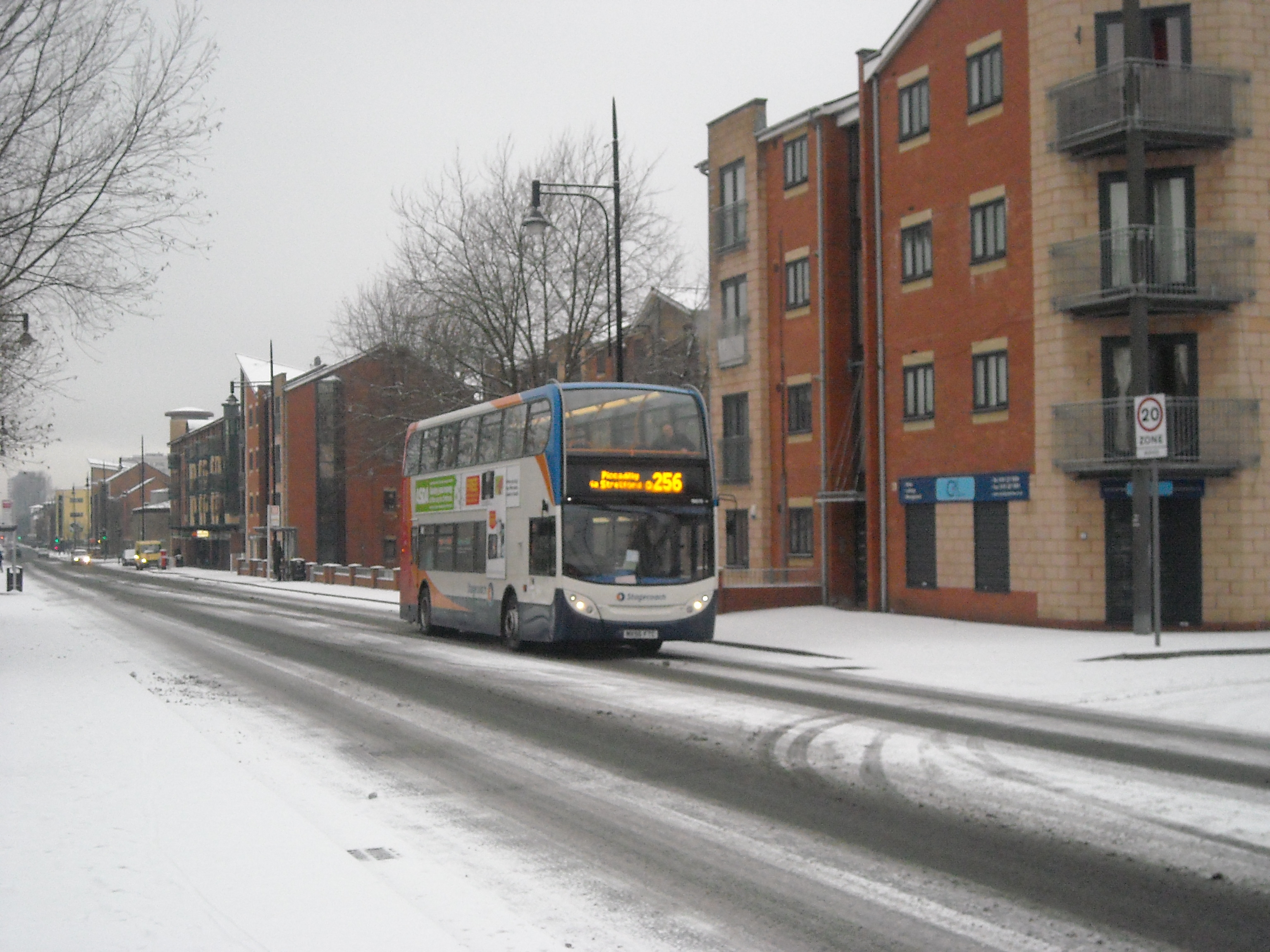 Stretford Road, Hulme (02)